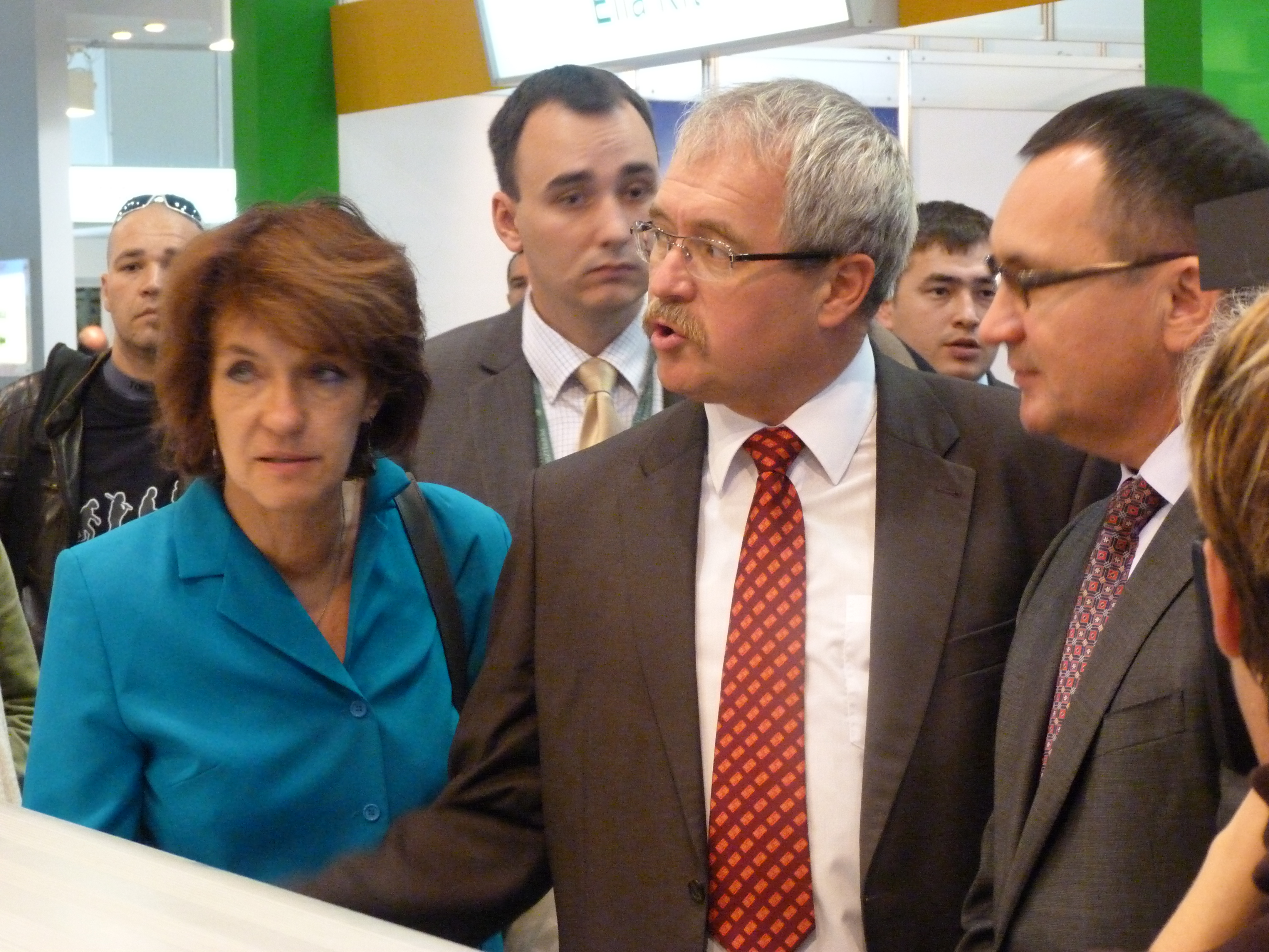 A felvételek 2013. szeptember 18 -án készültek Budapesten. Ezen a napon nyilt meg a HUNGEXPO Vásárközpontban az Országos Mezőgazdasági és Élelmiszeripari Kiállítás és Vásár, a 76. OMÉK. Fazekas Sándor vidékfejlesztési miniszter és az orosz delegáció vezetője, Nyikolaj Fjodorov orosz mezőgazdasági miniszter megtekintik a magyar kiállítók áruit. ©© Derzsi Elekes Andor, Budapest, 2013, You are authorised to use these photos and vids under Creative Commons – even for commercial, for profit purposes. Photos must be attributed to Derzsi Elekes Andor. All of the photos and vids in the Metapolisz DVD line are under Creative Commons and can be used even for commercial – for profit – purposes. Recommended Citation Derzsi Elekes Andor: Metapolisz DVD line